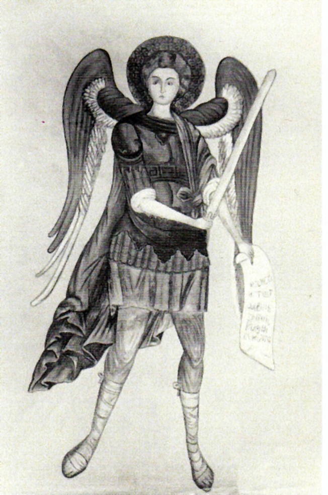 Arhanghelul Mihail